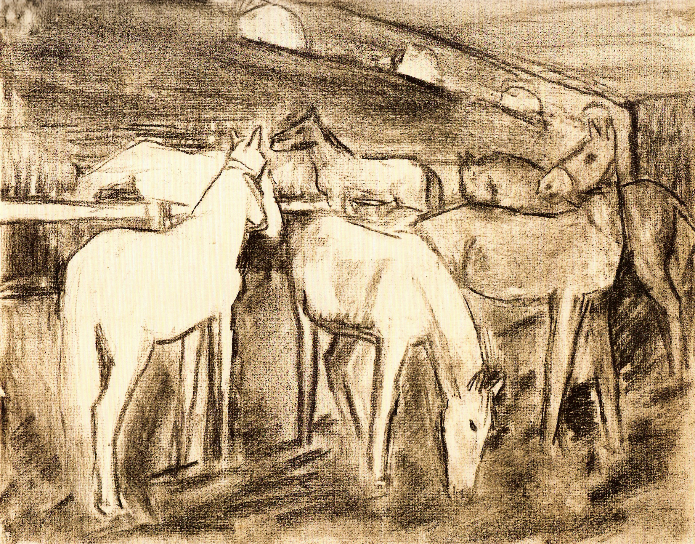 Pferdegruppe im Stall (Kohlezeichnung, 29 x 49 cm)